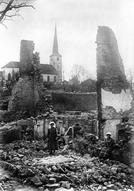 Taintrux (près de St-Dié) : seul le quartier de l'église a été respecté : [photographie de presse] . Bibliothèque nationale de France, département Estampes et photographie